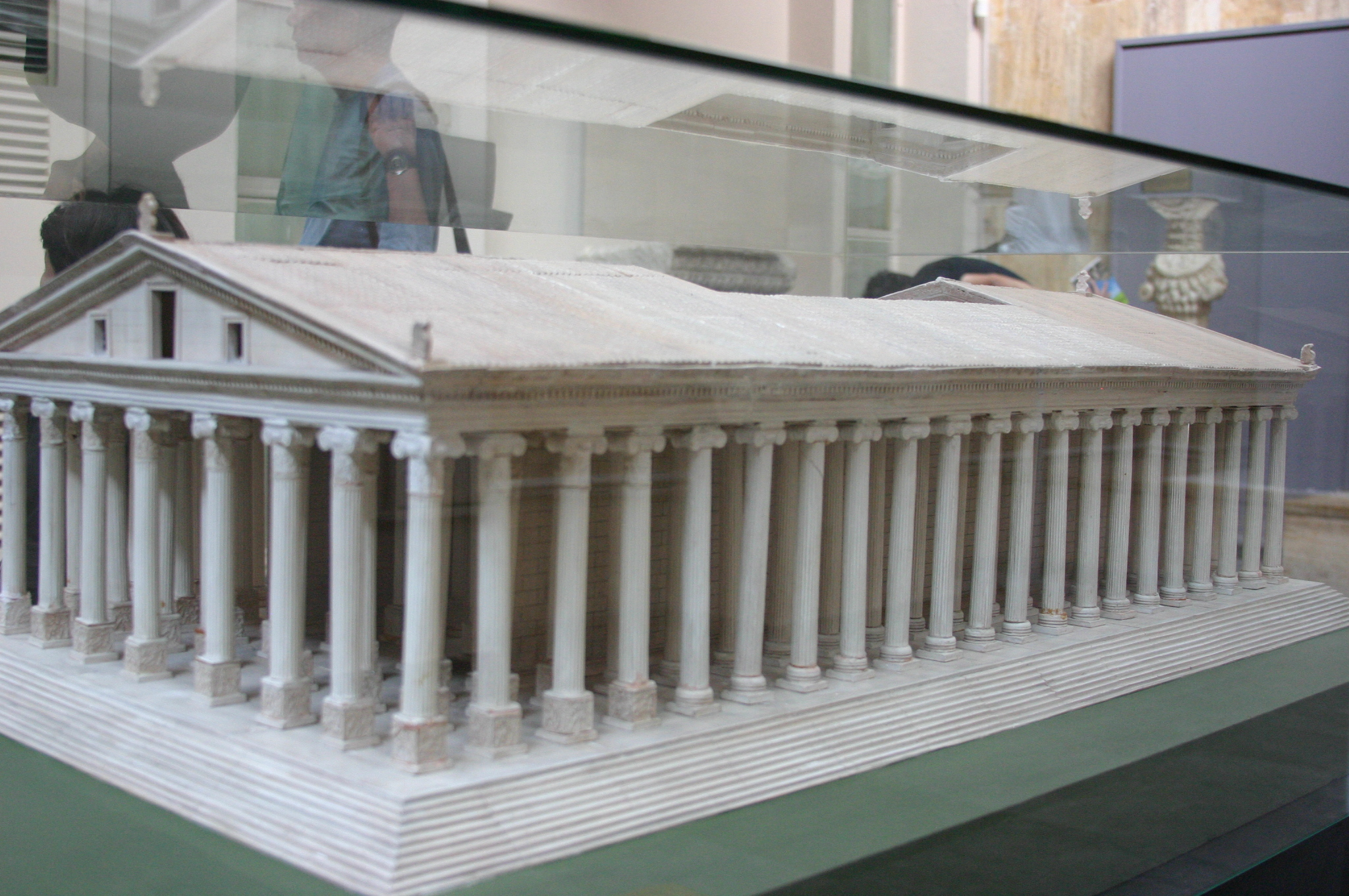 Modelo do Artemisium